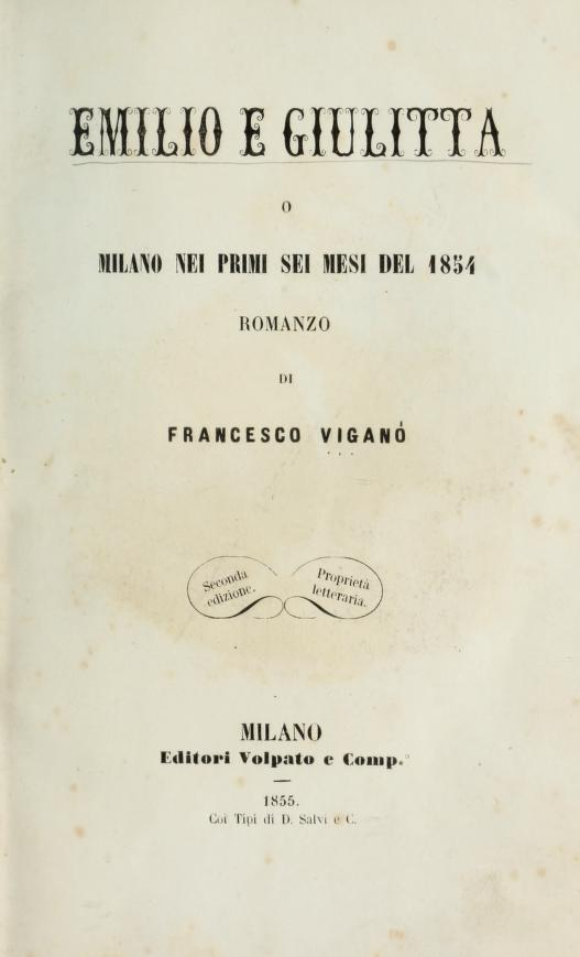 Frontespizio del volume pubblicato nel 1855 da Volpato, Milano